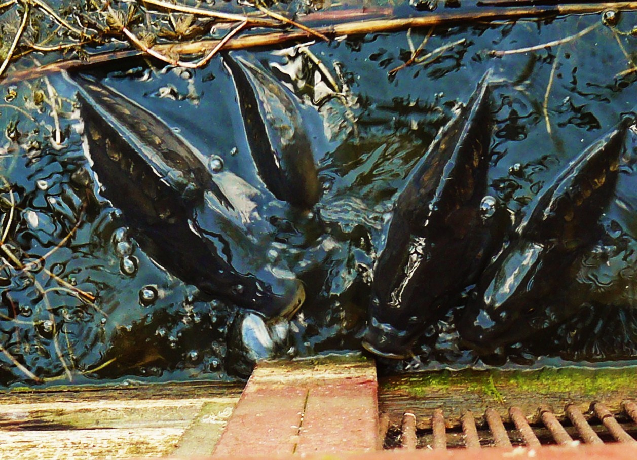 Stawy Milickie - kompleks Jamnik. Karpie milickie przy śluzie.